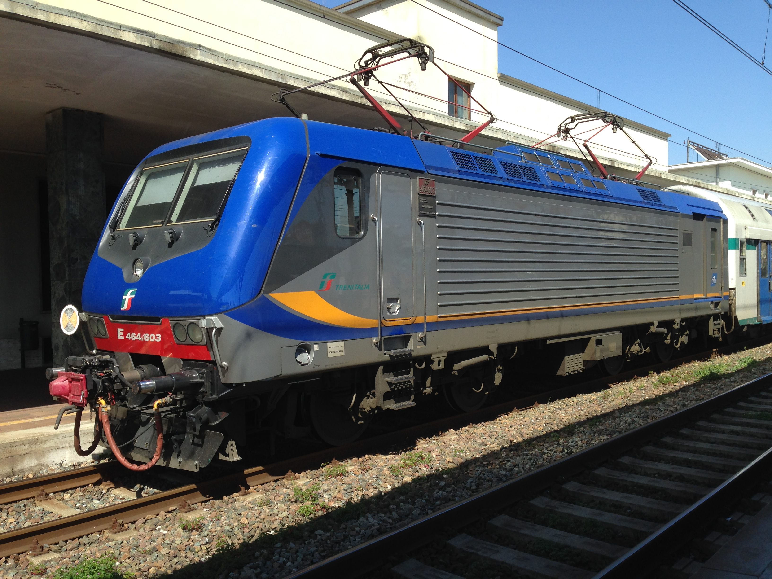 Locomotiva E.464.603 in sosta presso la stazione di Asti